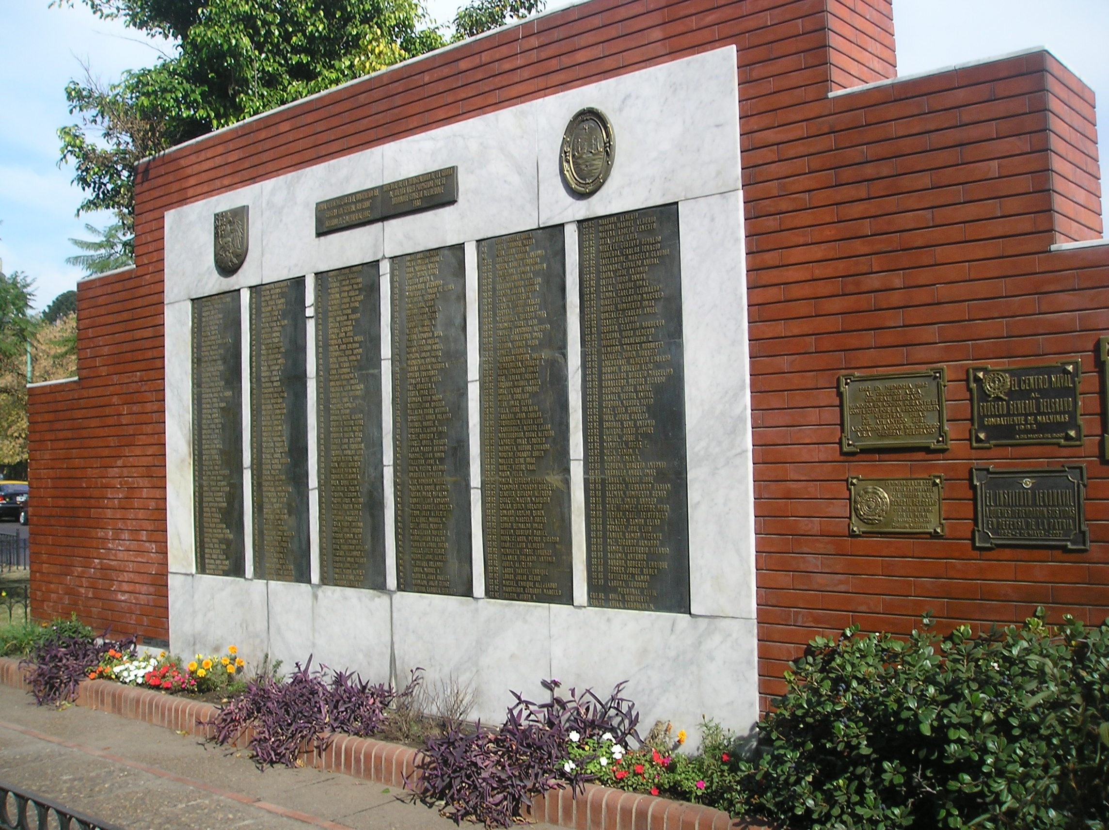 Monumento a los caídos en el hundimiento del Crucero General Belgrano. Parque Centenario, Buenos Aires.